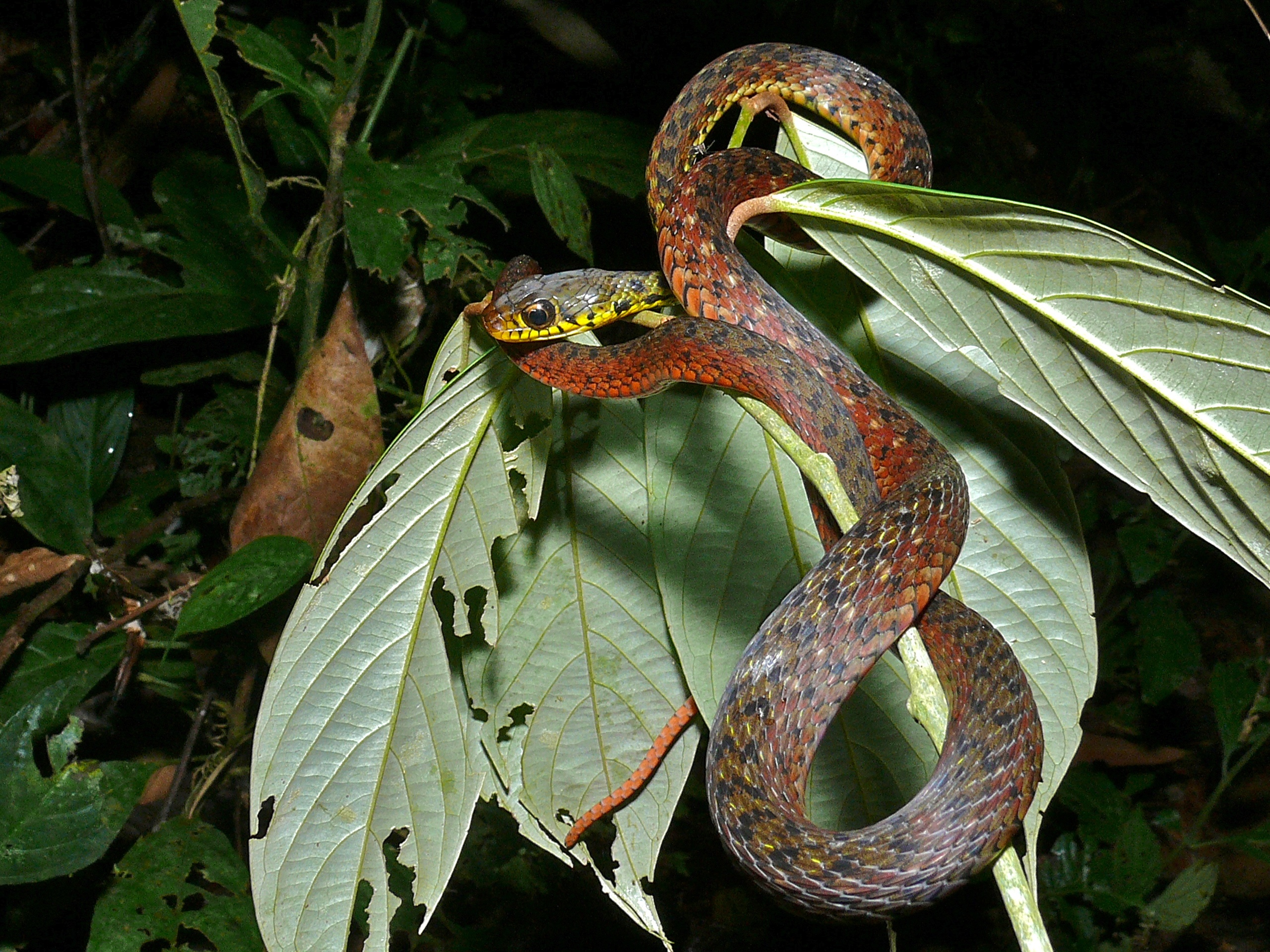 Gunung Mulu NP, Sarawak, MALAYSIA